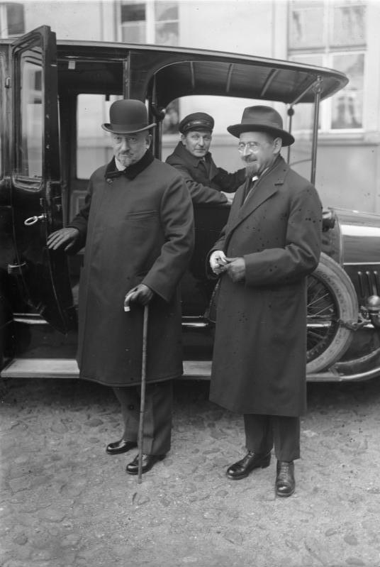 Der russische Aussenminister Tschitscherin weilt augenblicklich zu politischen Besprechungen in Berlin. Der russische Aussenminister Tschitscherin links, und der russische Botschafter in Berlin, Krestinski, rechts, vor einem Besuch im Auswärtigen Amt. Information added by Wikimedia users.